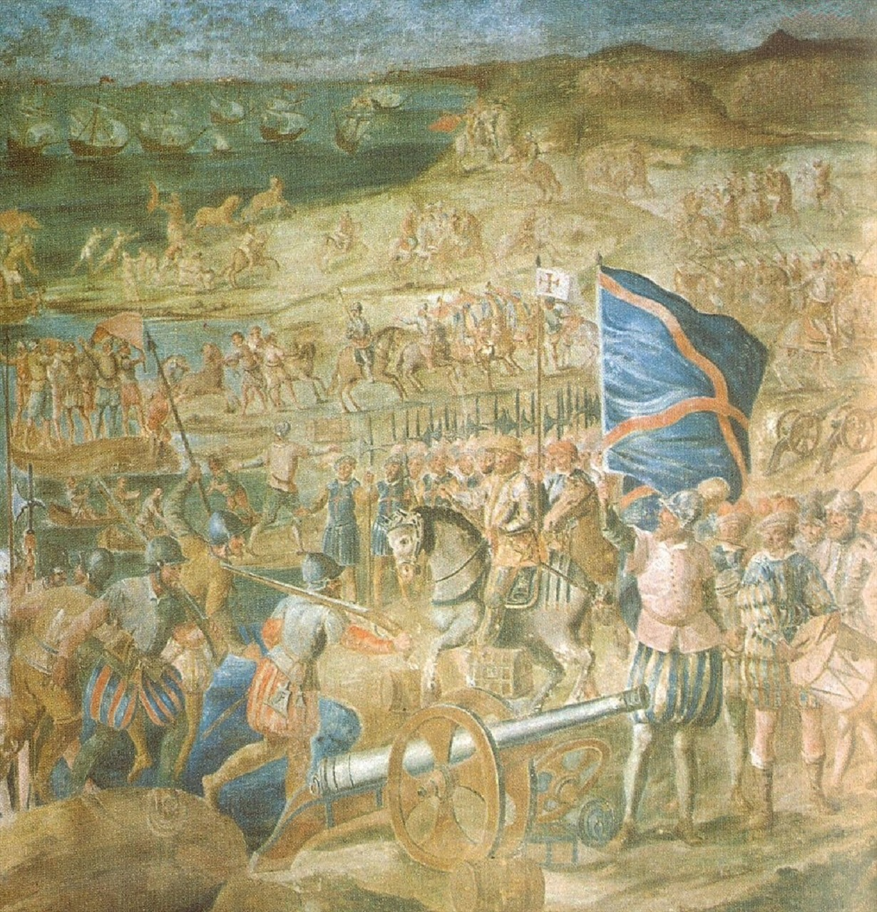 Fresco no Palácio Ducal de Vila Viçosa representando o desembarque das forças de D. Jaime I, 4.º duque de Bragança, durante a conquista de Azamor em Marrocos em 1513 pelo duque.